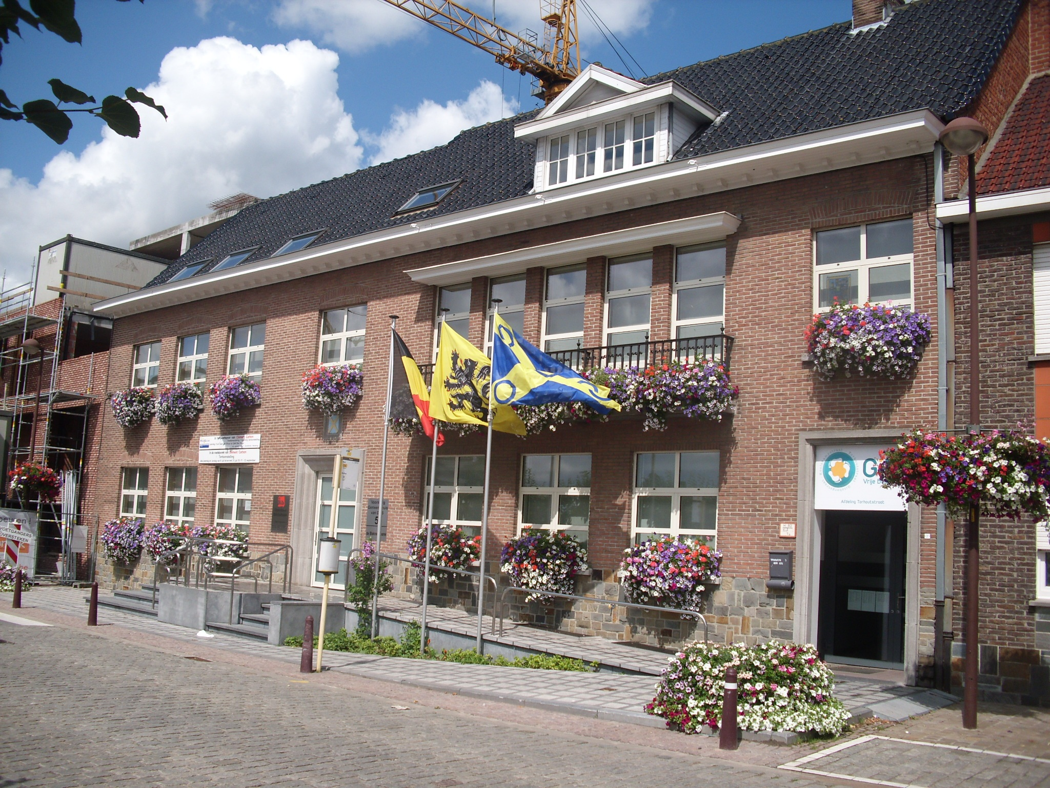 Voormalig gemeentehuis van Gits, heden de uitleenpost van de bibliotheek van Hooglede in Gits - Torhoutstraat 5 - Gits - Hooglede - West-Vlaanderen - Vlaams Gewest - België